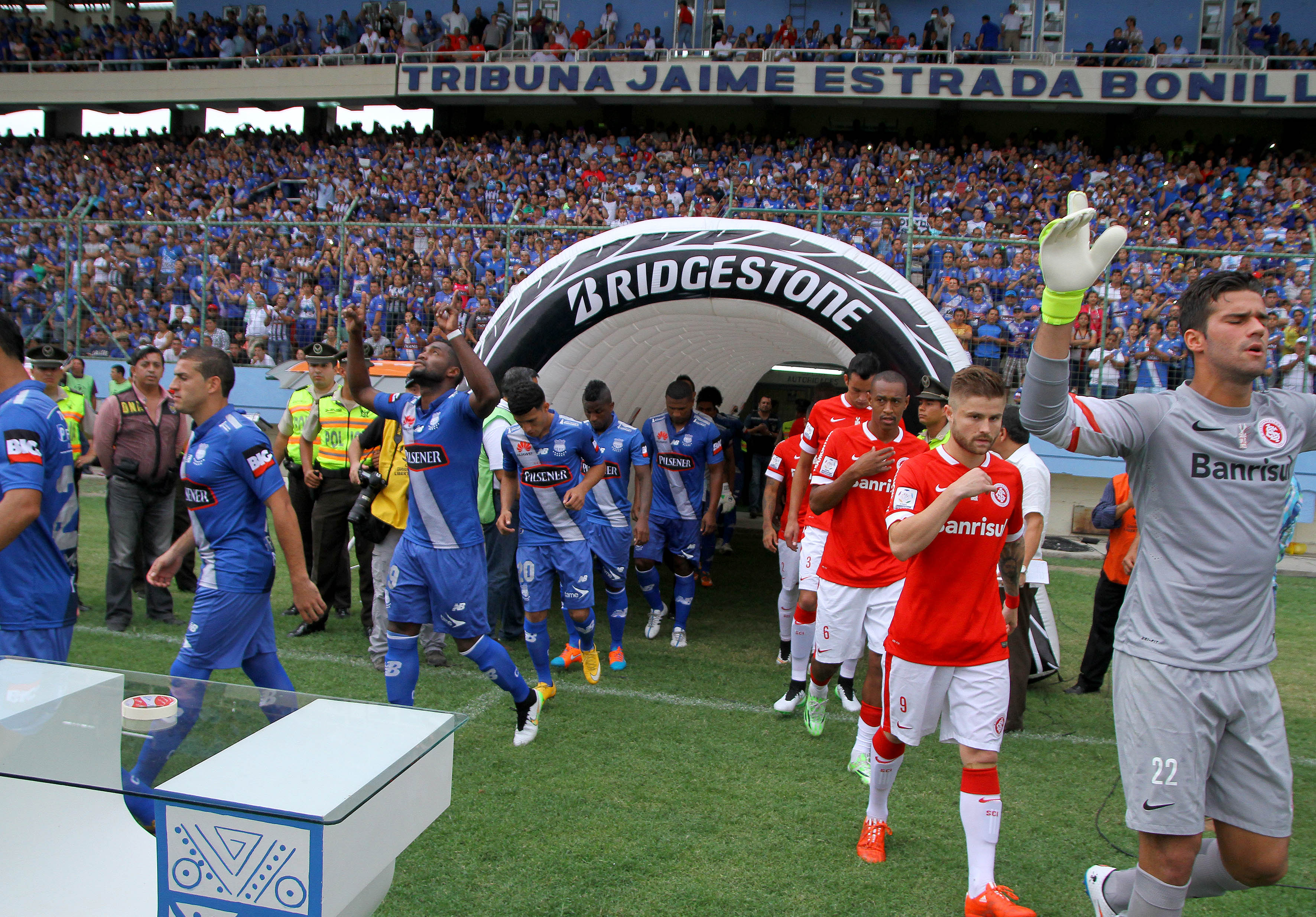 Guayaquil, Miércoles 18 de marzo del 2015 (ANDES).-Emelec se enfrenta a Internacional de Brasil por la Copa Libertadores Foto:César Muñoz/ANDES